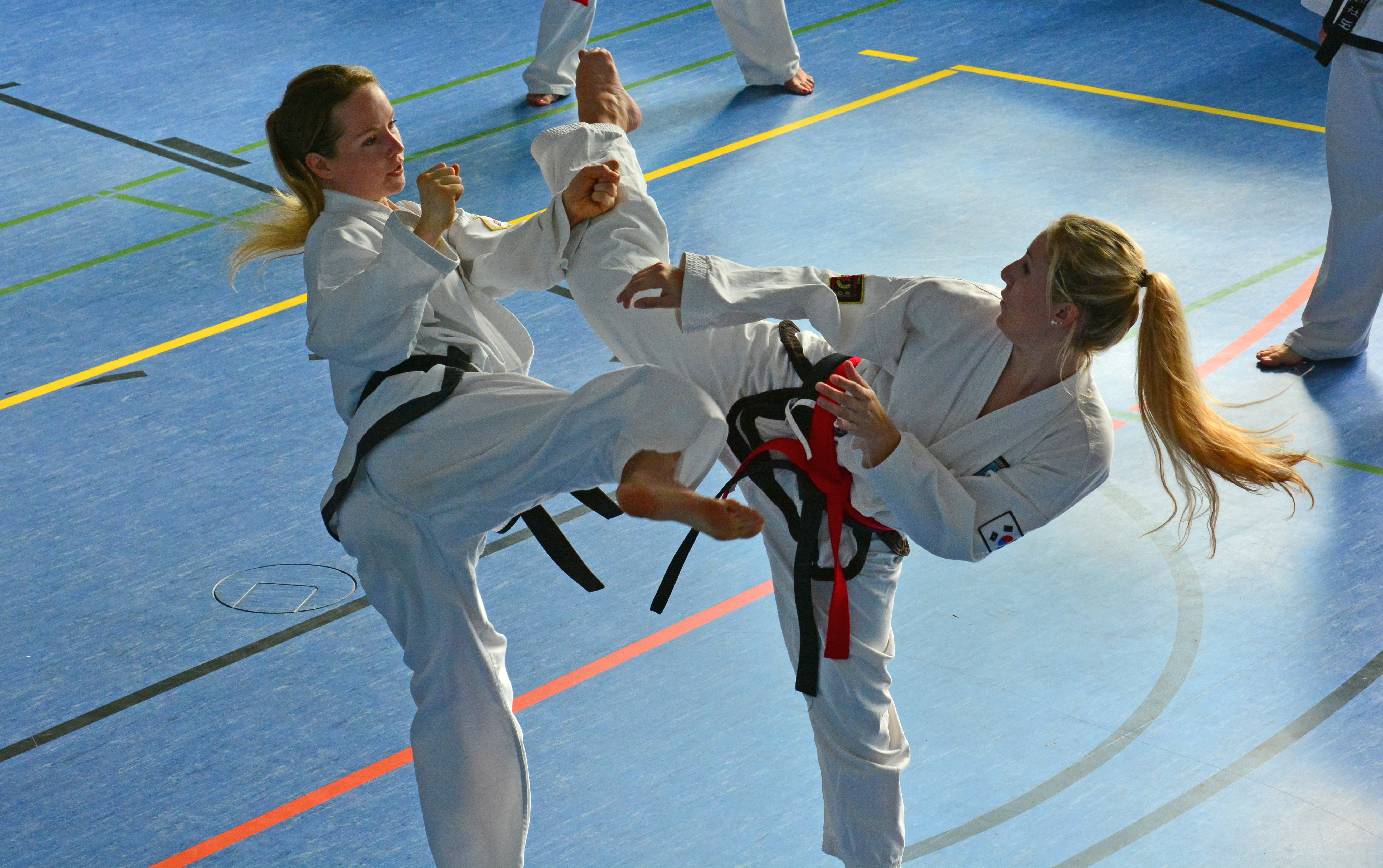 Die Taekwon-Do Landesmeisterschaften in Uetersen 2014